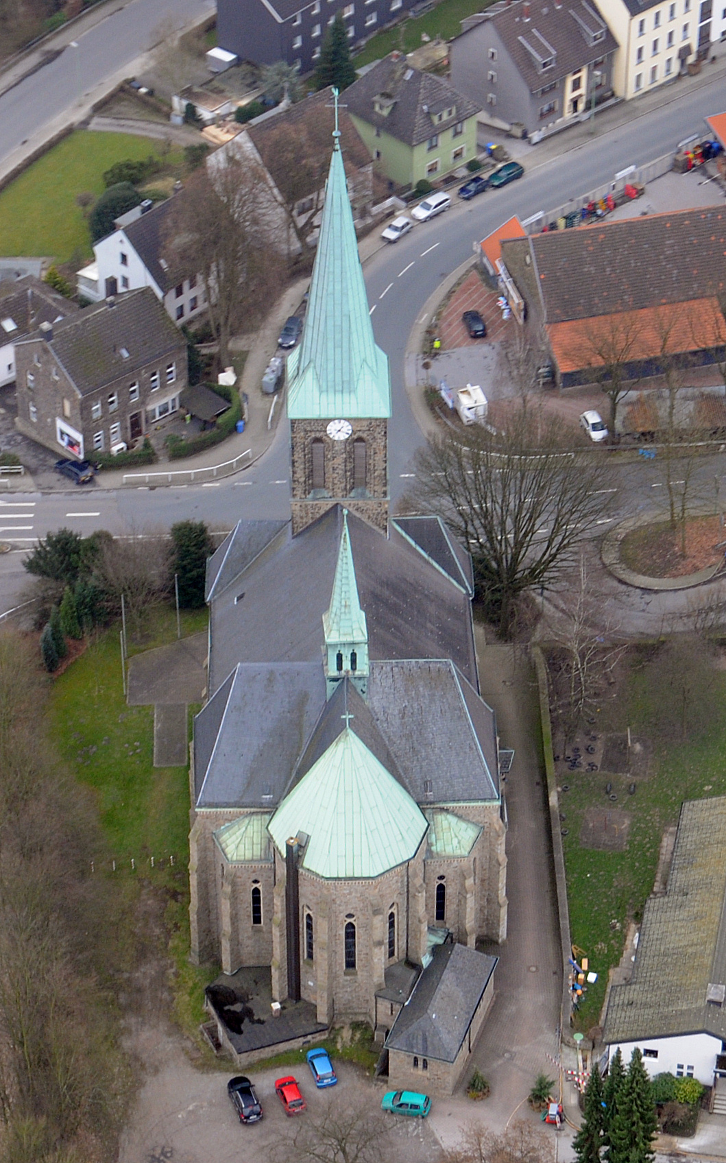 Luftbild der Kirche St. Mariä Geburt in Essen-Dilldorf